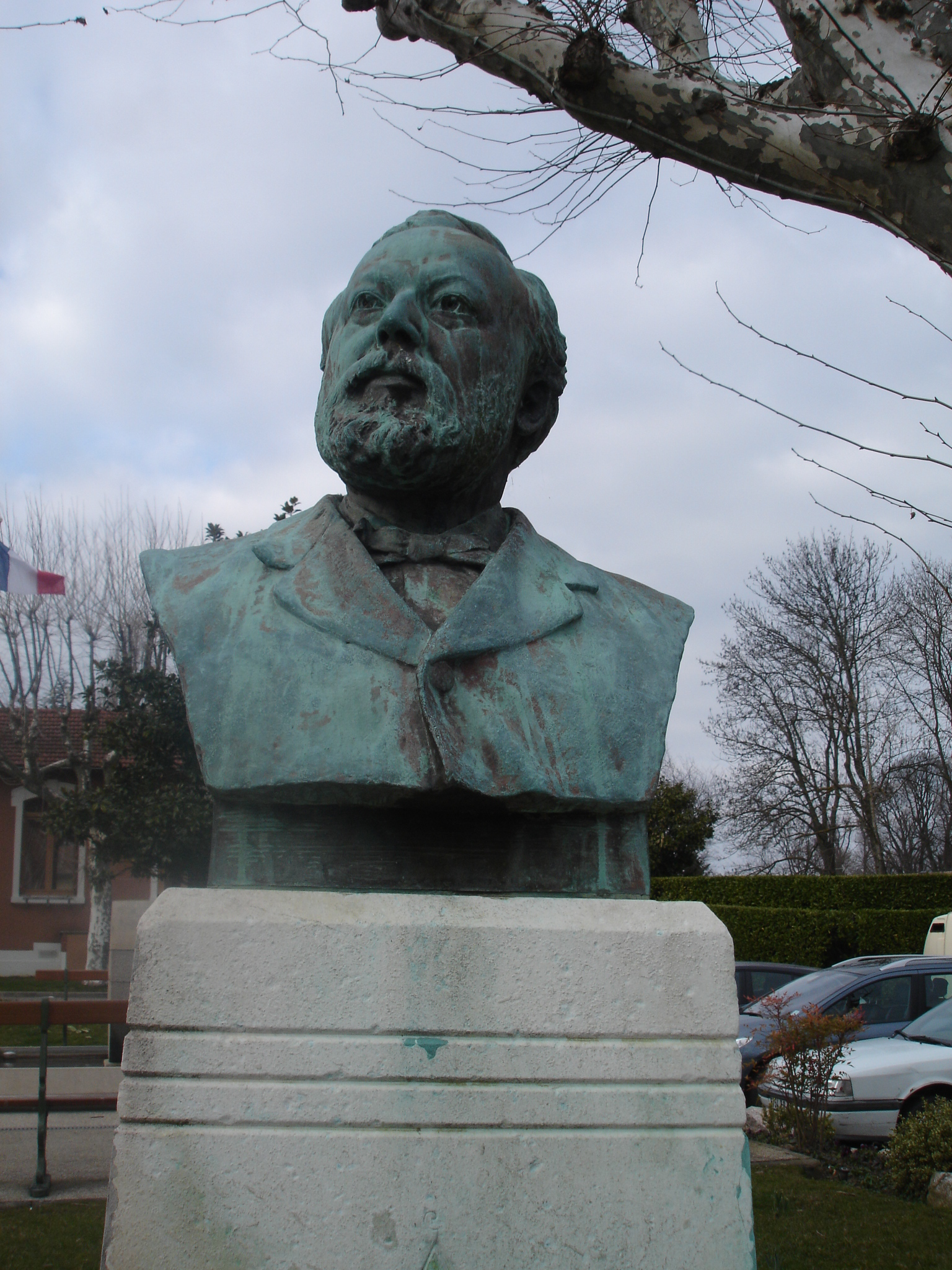 Chaponnay (69) : statue de Buyat